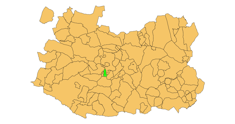 Cañada de Calatrava municipality map